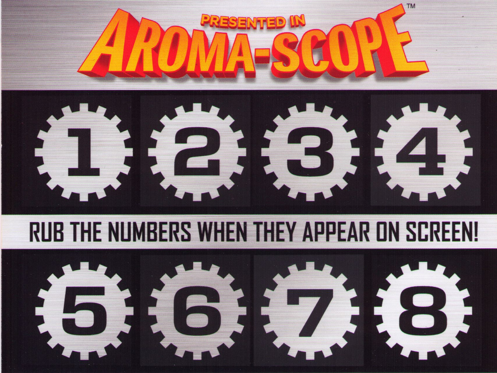 Aroma-Scope-Rubbelkarte